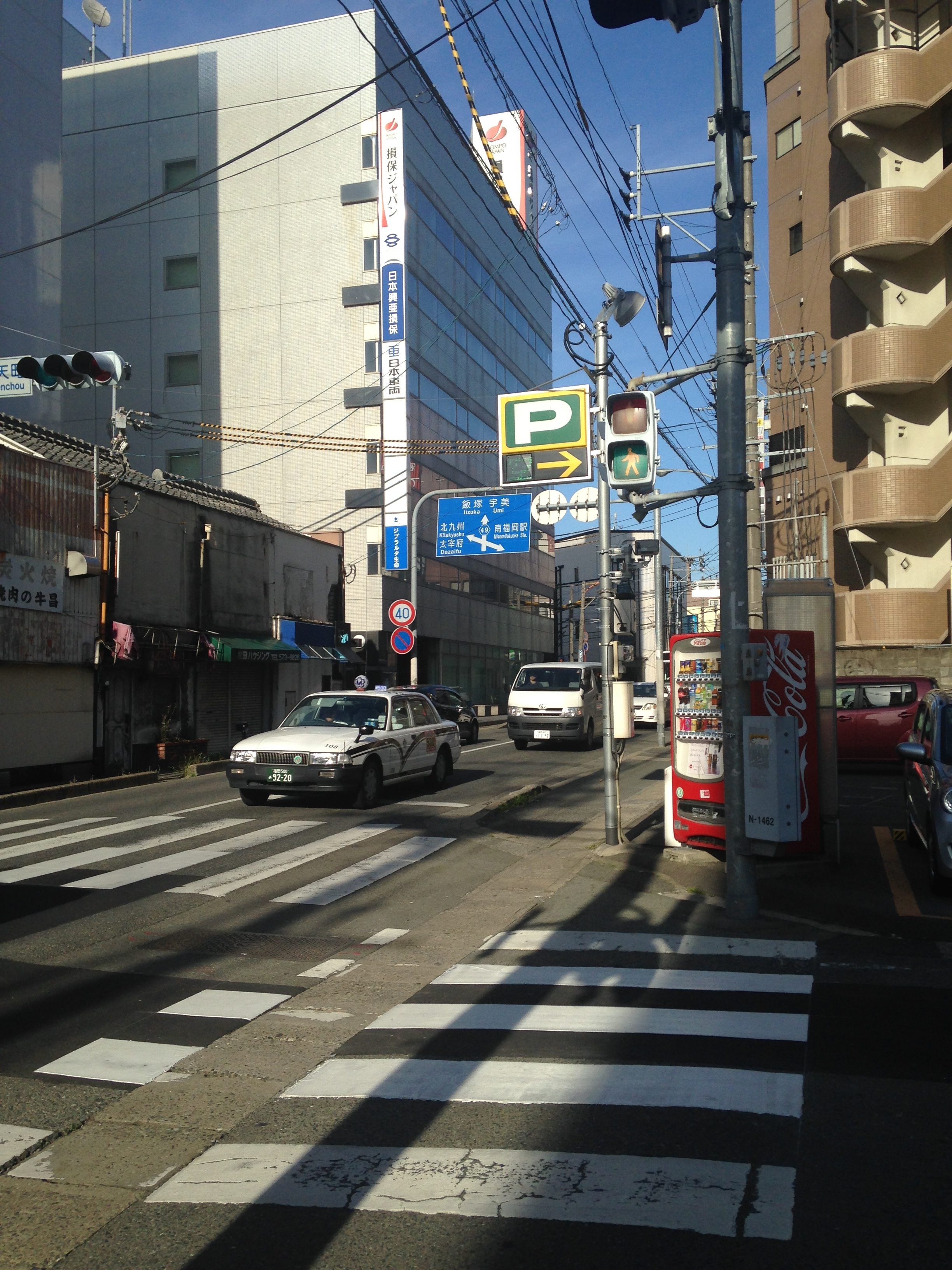 NTT前交差点付近の福岡県道49号